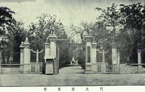 中文（香港）: 《北京師範大學研究所》嘅舊照片，過咗50年，進入公共領域。攝影嘅作者不明。